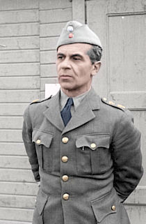 21. Divisioonan komentaja Niilo Hersalo.